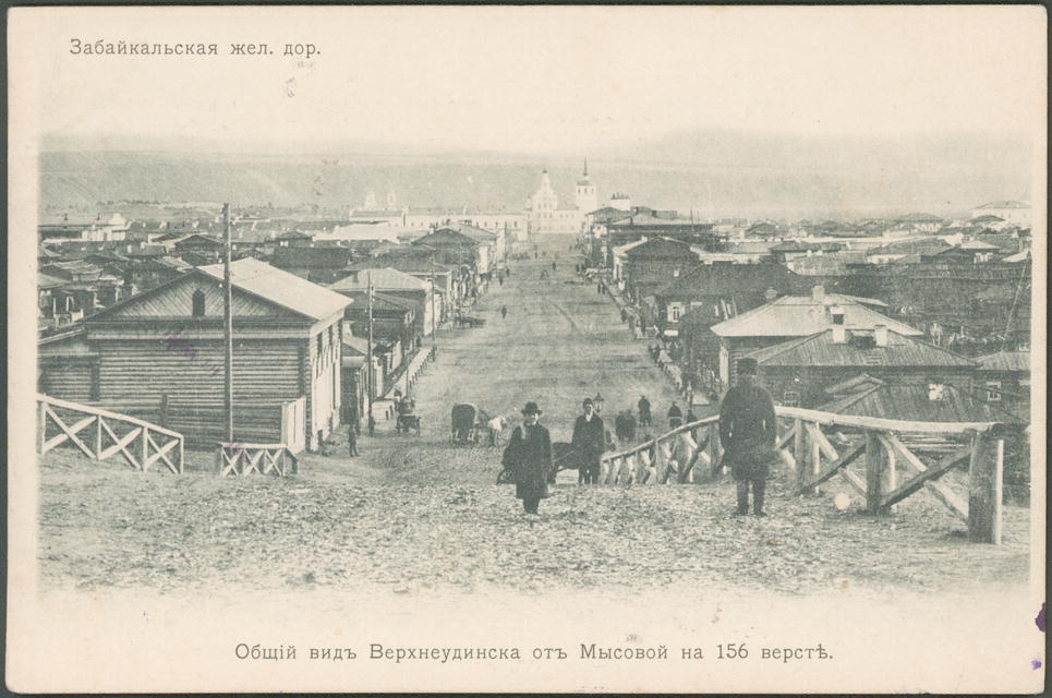 Улица Николаевская (Большая). Улица Ленина. Открытка